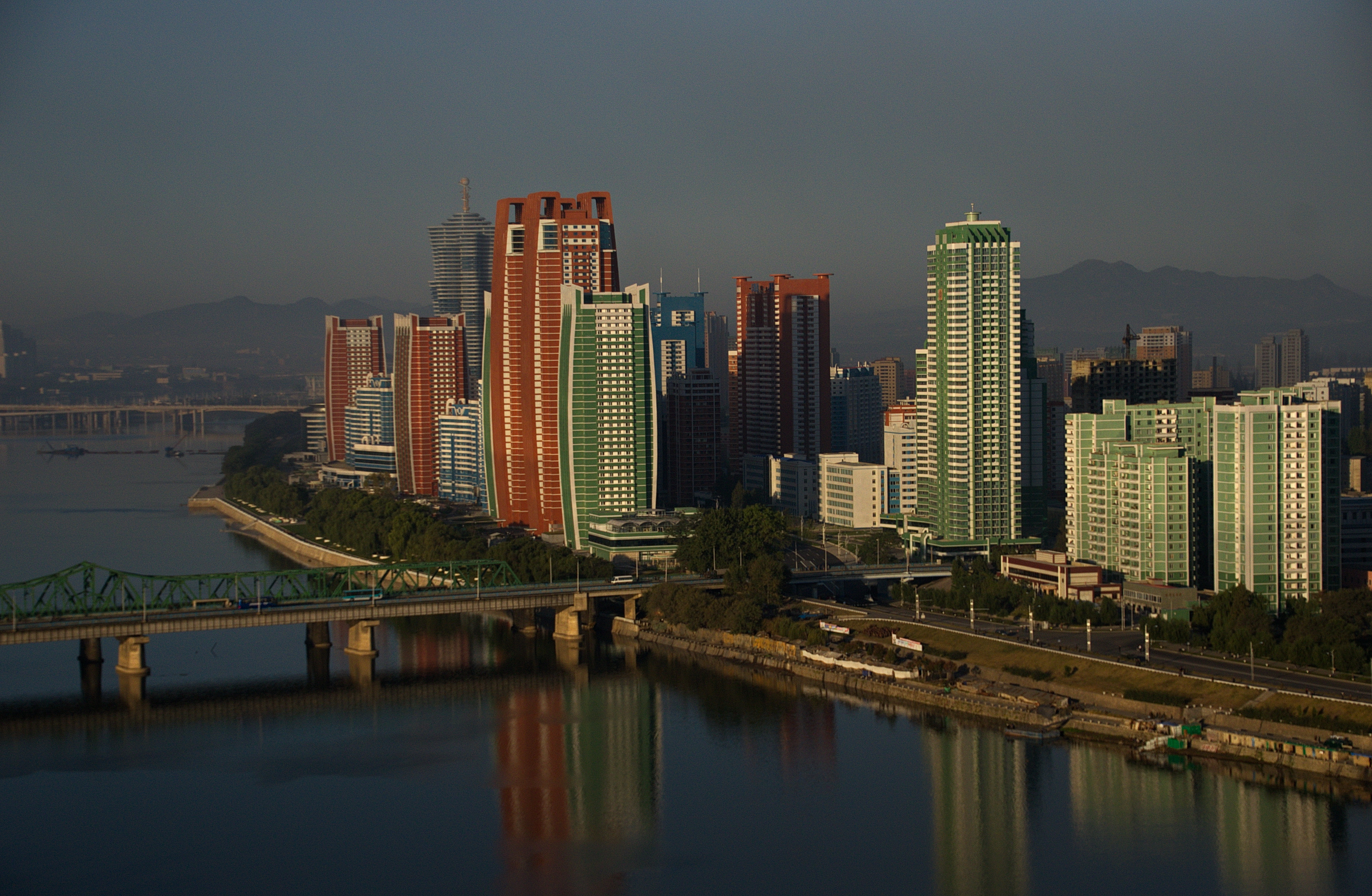 Nordkorea 2015 - Pjöngjang